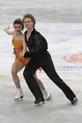 Николь Офорд и Томас Уильямс (Канада) на чемпионате мира по фигурному катанию среди юниоров 2012